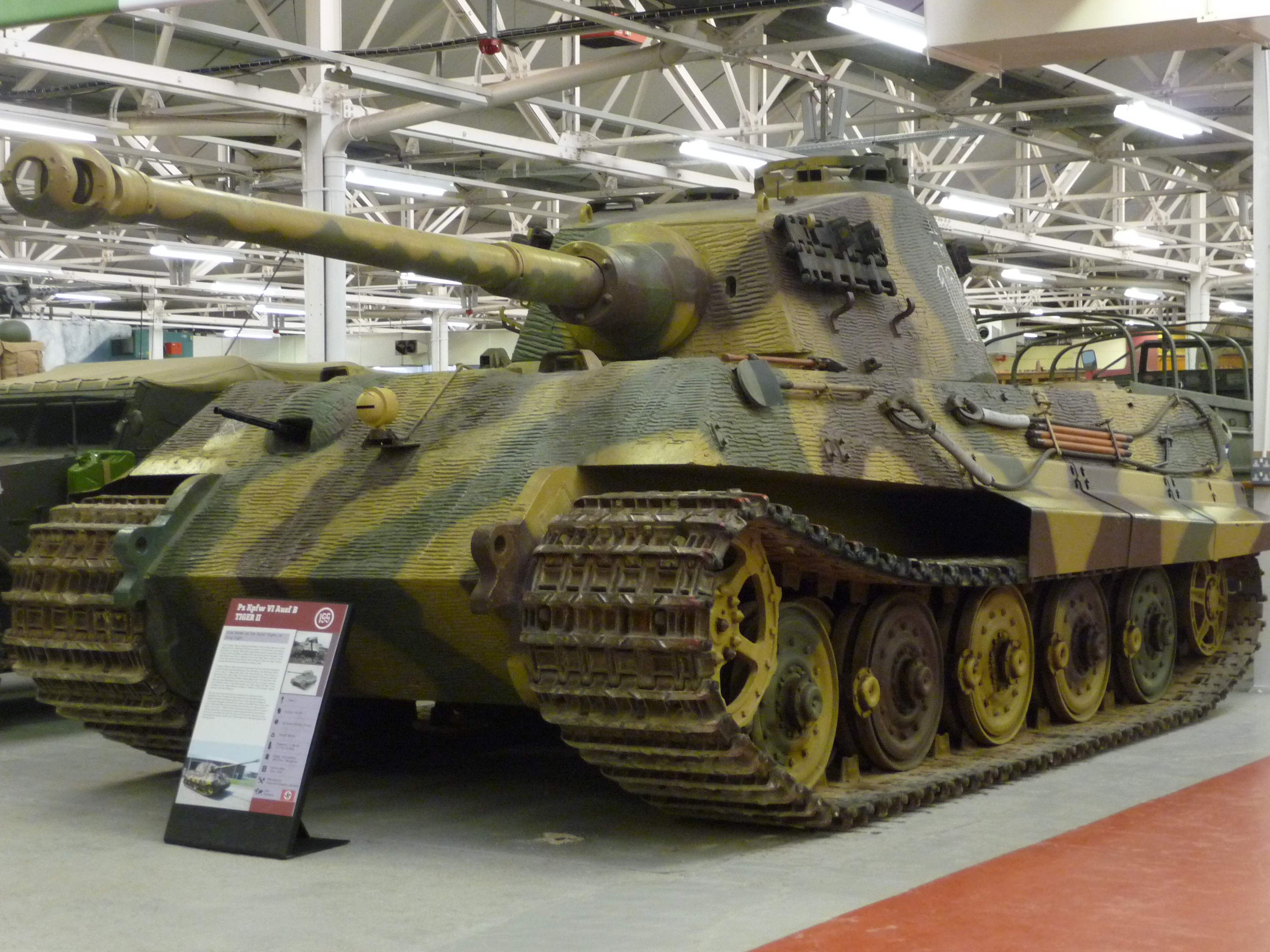 Sd Kfz 182 Panzerkampfwagen VI Ausf B (Tiger 2)